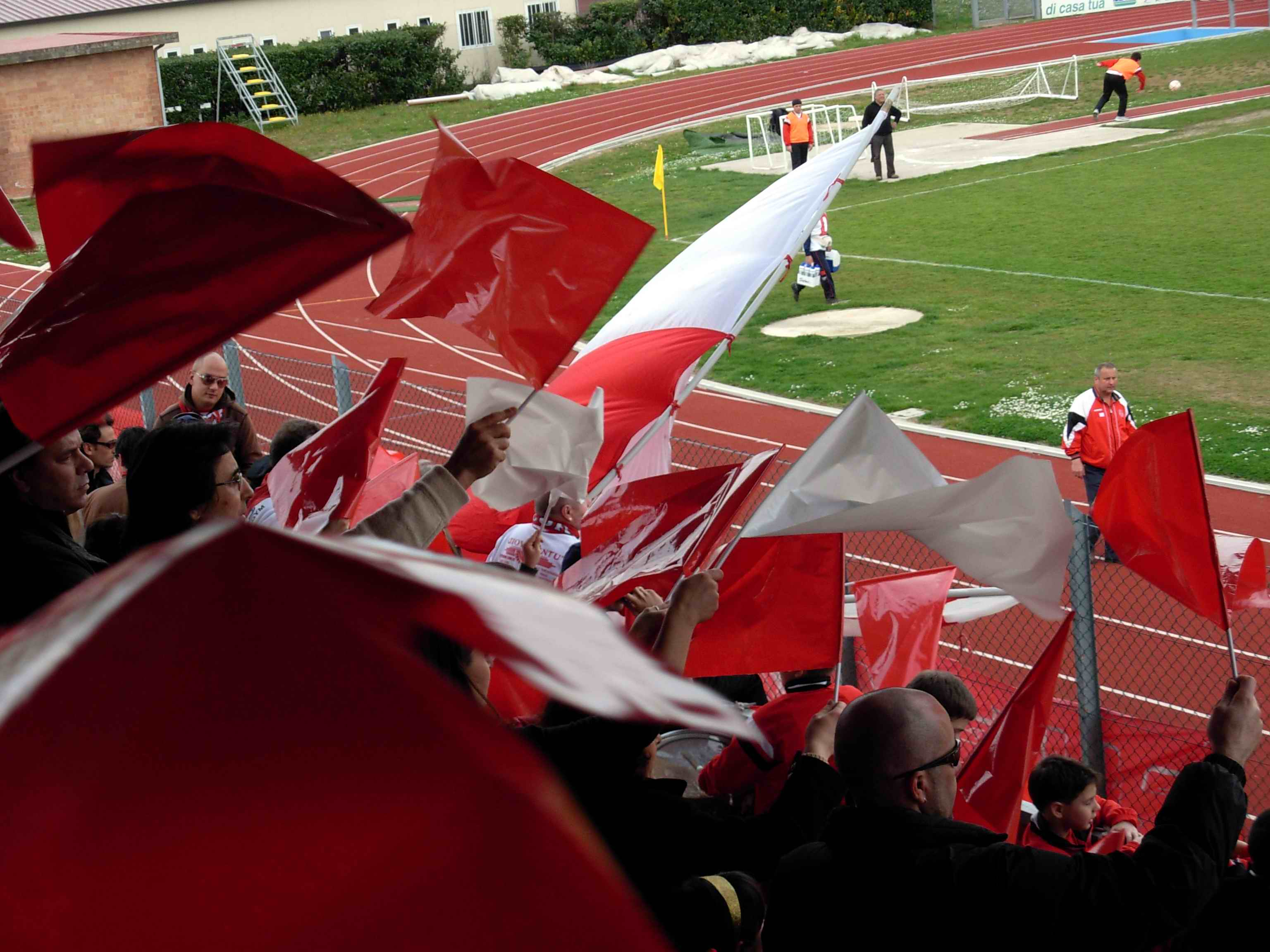 Colle di Val d'Elsa- Colligiana: tribuna in festa per la promozione della Colligiana in Serie D